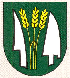 Erb obce Zeleneč (HR: ?)